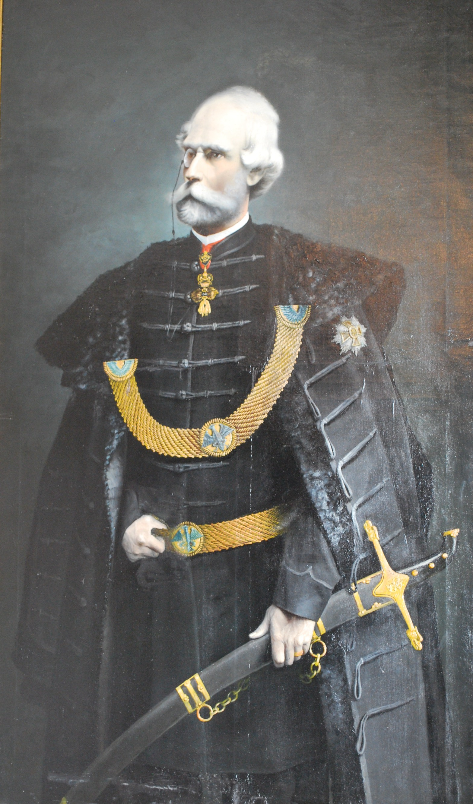 Sennyey Pál császári és királyi kamarás, a főrendiház elnöke.